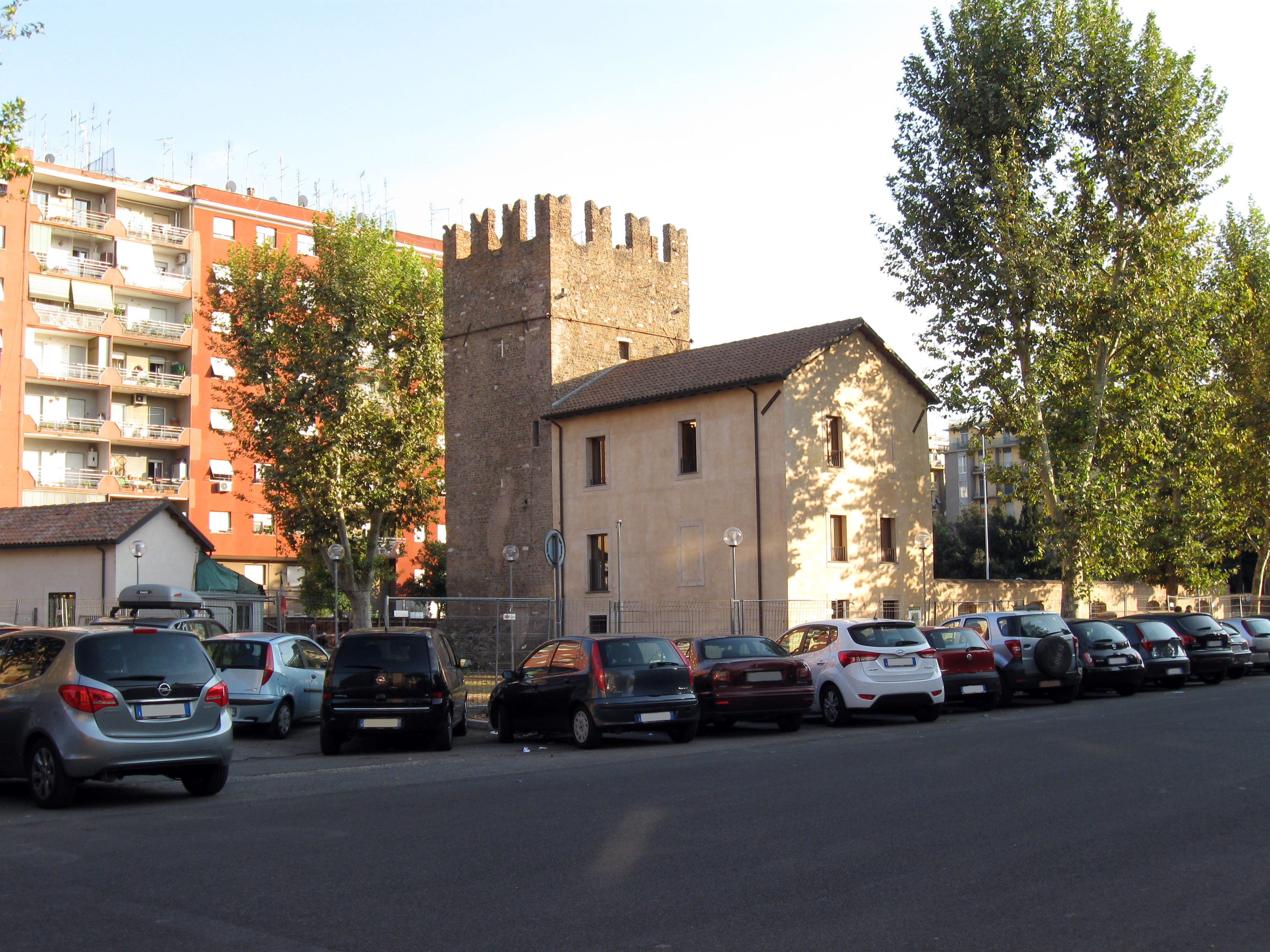 Casale (e torre) del Quadraro